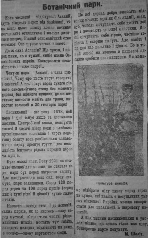 Шаліт М. Ботаничний парк. Газета „Комуніст*. 25/VIIÏ 1928, Харків.